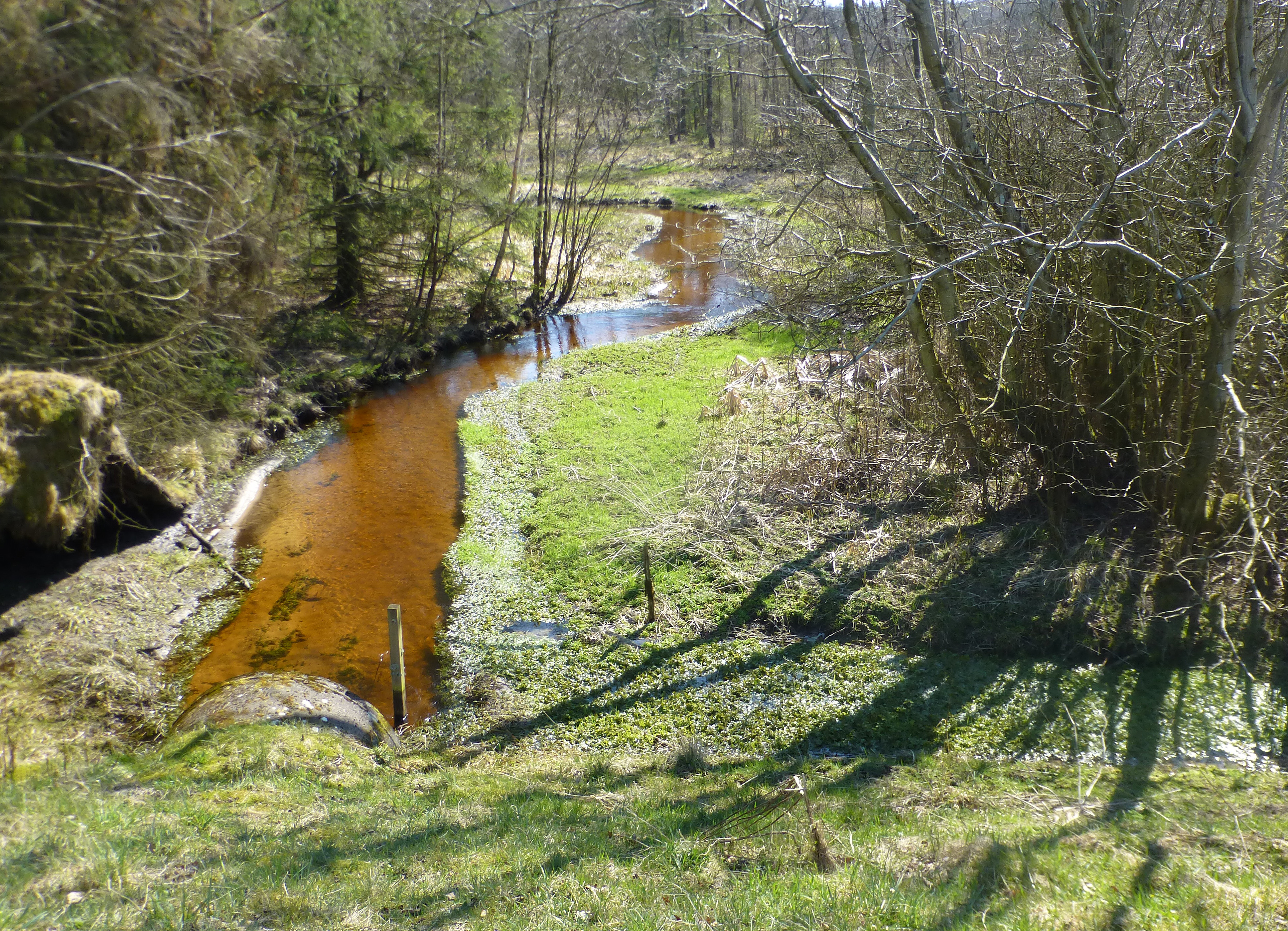 Boest Bæk, den øvre del af Mattrup Å, hvor vejen mellem Nørre Snede og Silkeborg krydser